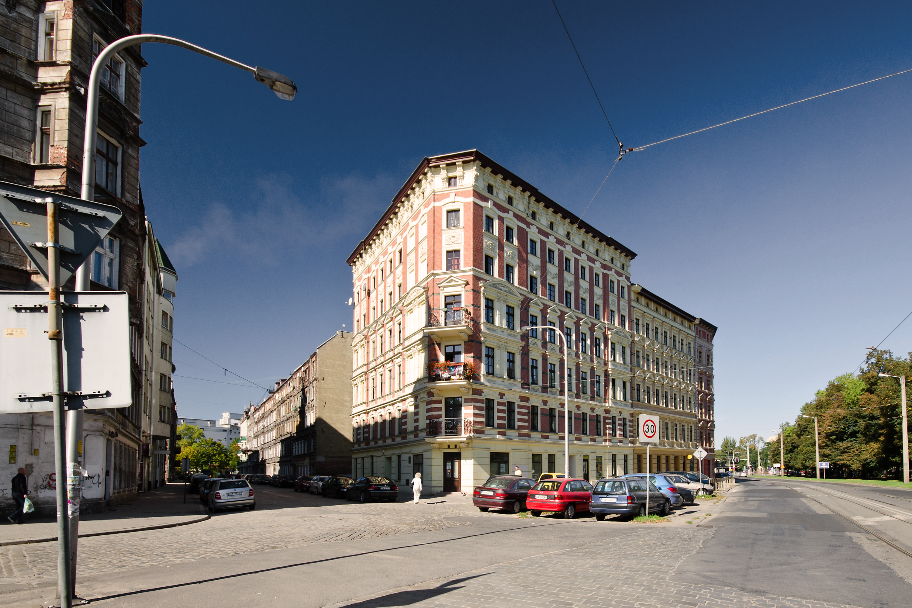 Kamienica pl. Staszica 12, Miasto Wrocław - Śródmieście